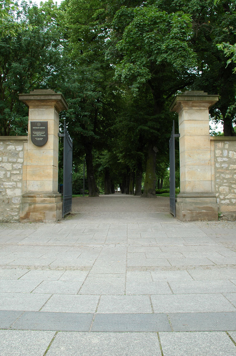 Eingang Brühlergarten (1925 umgestaltet zum Park), am Mainzerhofplatz in Erfurt